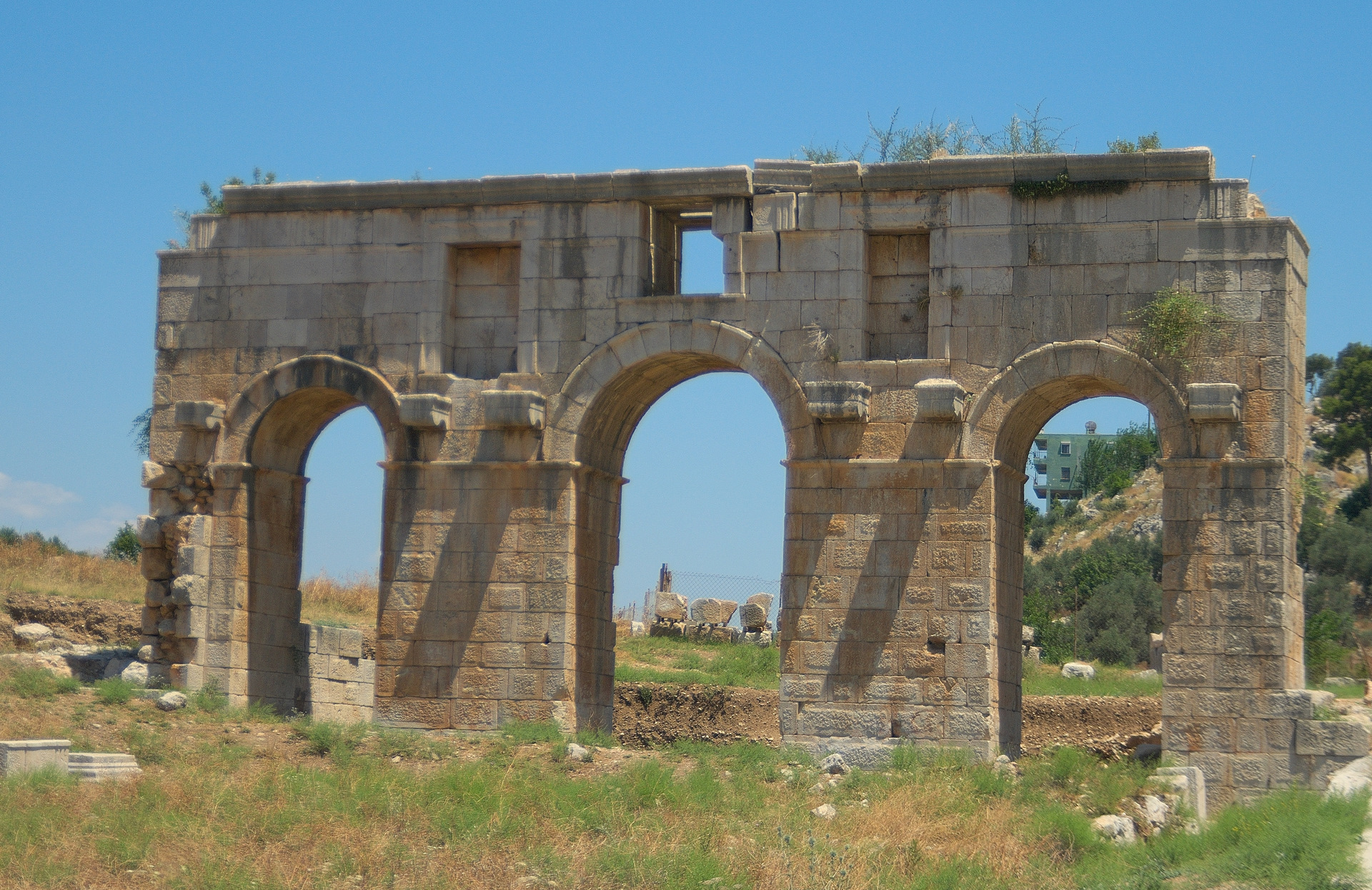 Патара. Ворота Меттия Модеста